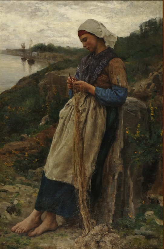 Fille de pêcheur, raccommodeuse de filets (La jeune fille est coiffée d'un serre tête rouge sous une cornette blanche, elle est vêtue d'un jupon de laine bleu et d'un corsage fauve. Elle porte autour du cou un mouchoir de coton violet croisé sur sa poitrine, sur ses bras de fausses manches et devant elle un tablier de toile grise) Tableau peint au Port-Rhu à Douarnenez entre 1876 et 1878